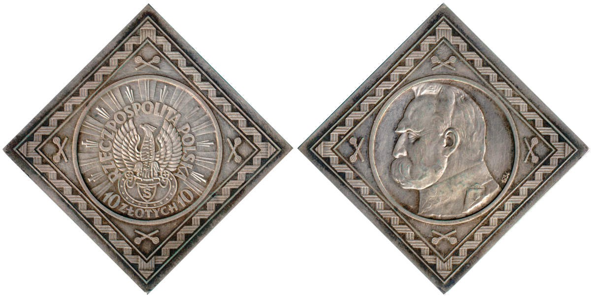 Klipa 10 zlotych Jozef Pilsudski